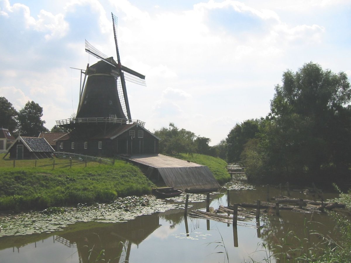 Bolwerksmolen/ Ten-Bruggencatenummer: 01010: Achtkante stellingmolen van opzij gefotografeerd (opmerking: Foto gemaakt in het kader van het project Actualisering Monumentenregister (AMR).)